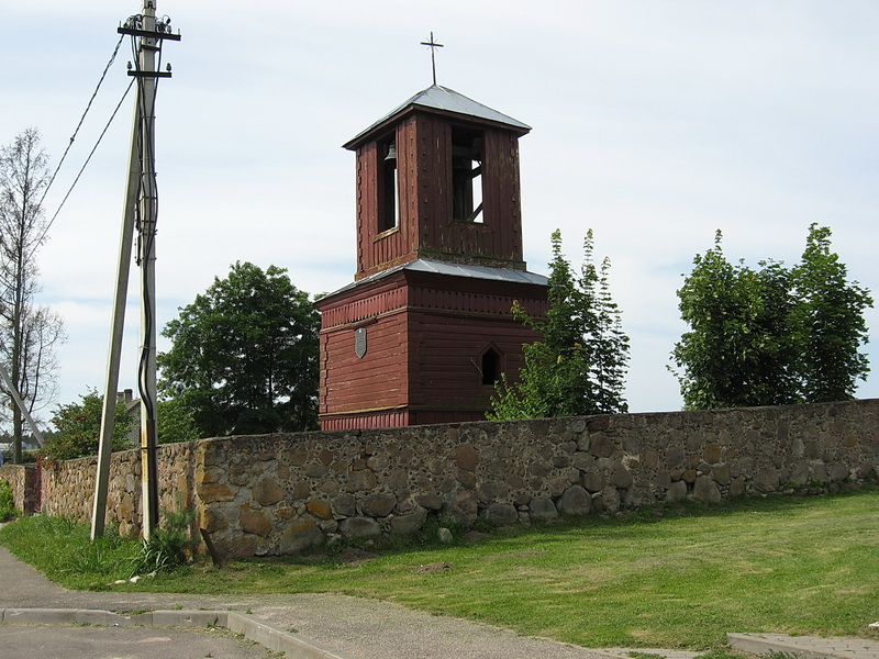 Граўжышкі. Тэрыторыя, дзе размяшчаўся Георгіеўскі касцёл